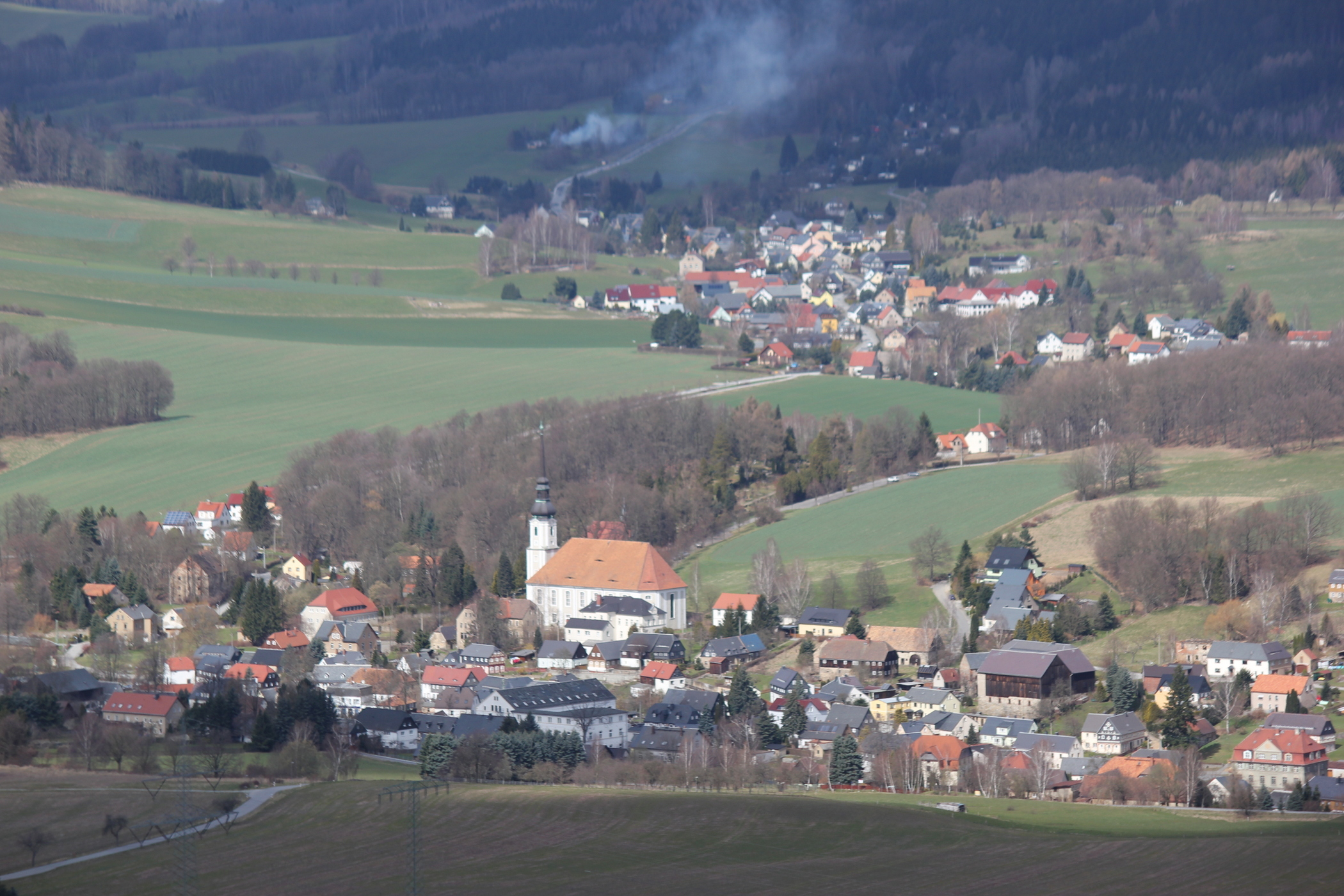 Hornjoserbsce: Wuhlad wot Běłoboha na Kumwałdsku cyrkej.